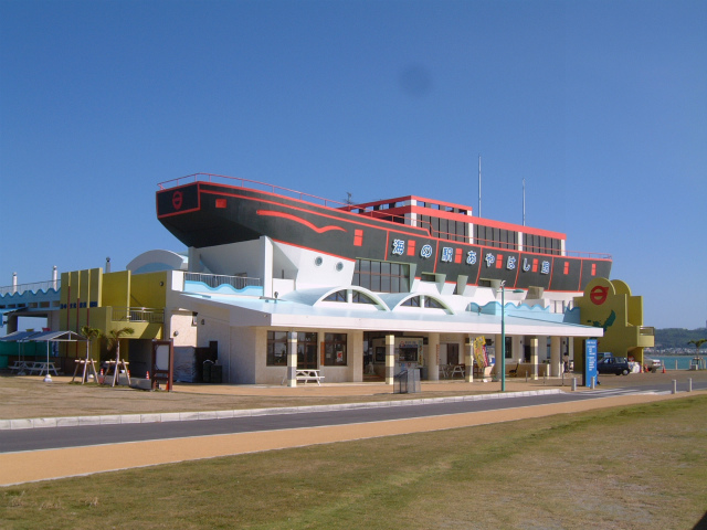 海の駅あやはし館の外観。2階に海の文化資料館がある。